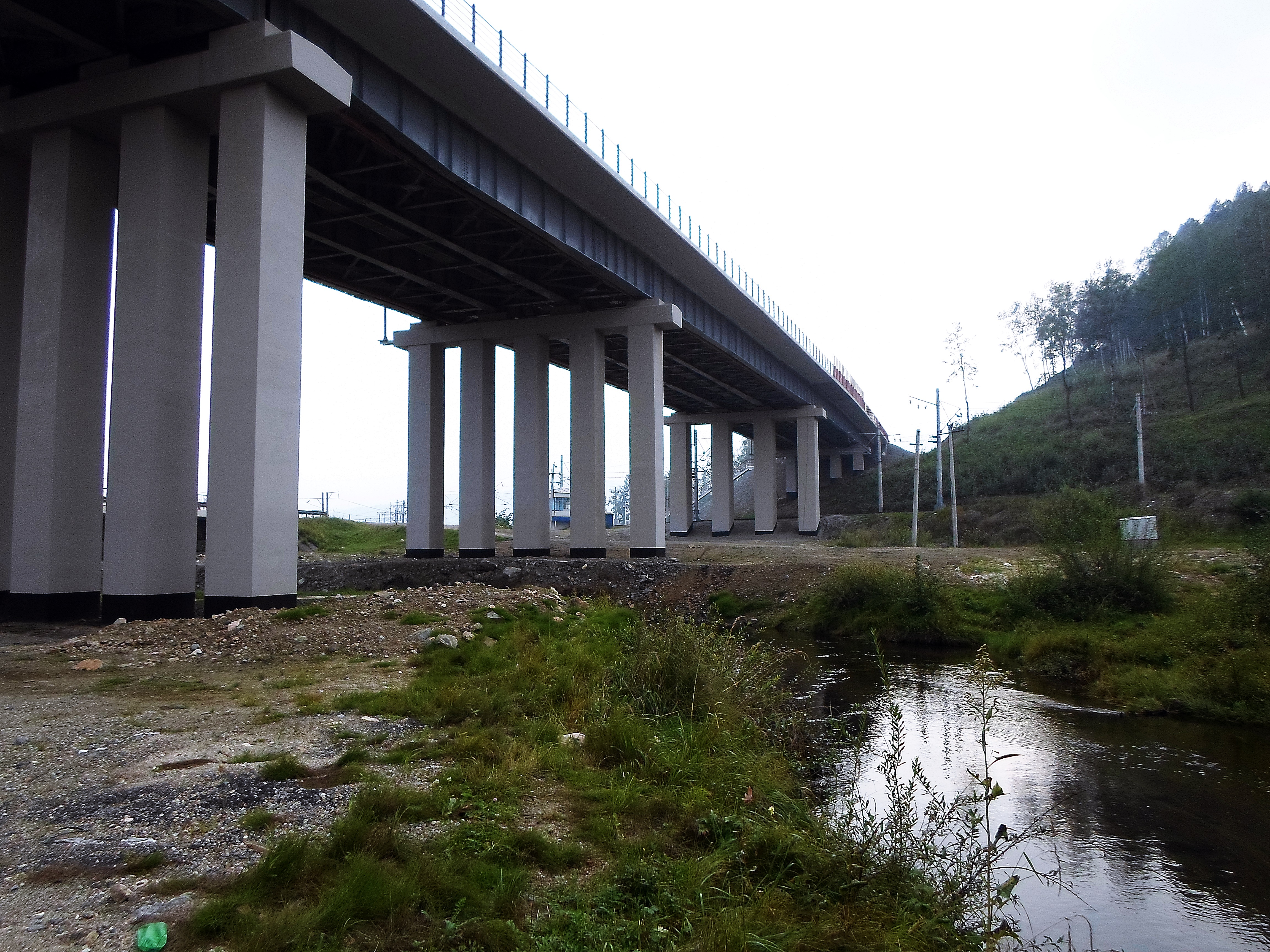 Река Култучная перед мостом федеральной трассы "Байкал" у посёлка Култук.